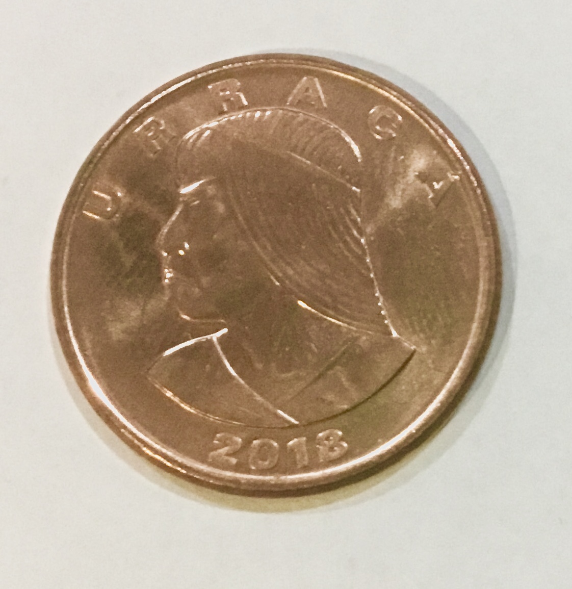 Moneda de un centésimo de balboa, acuñada en el 2018.